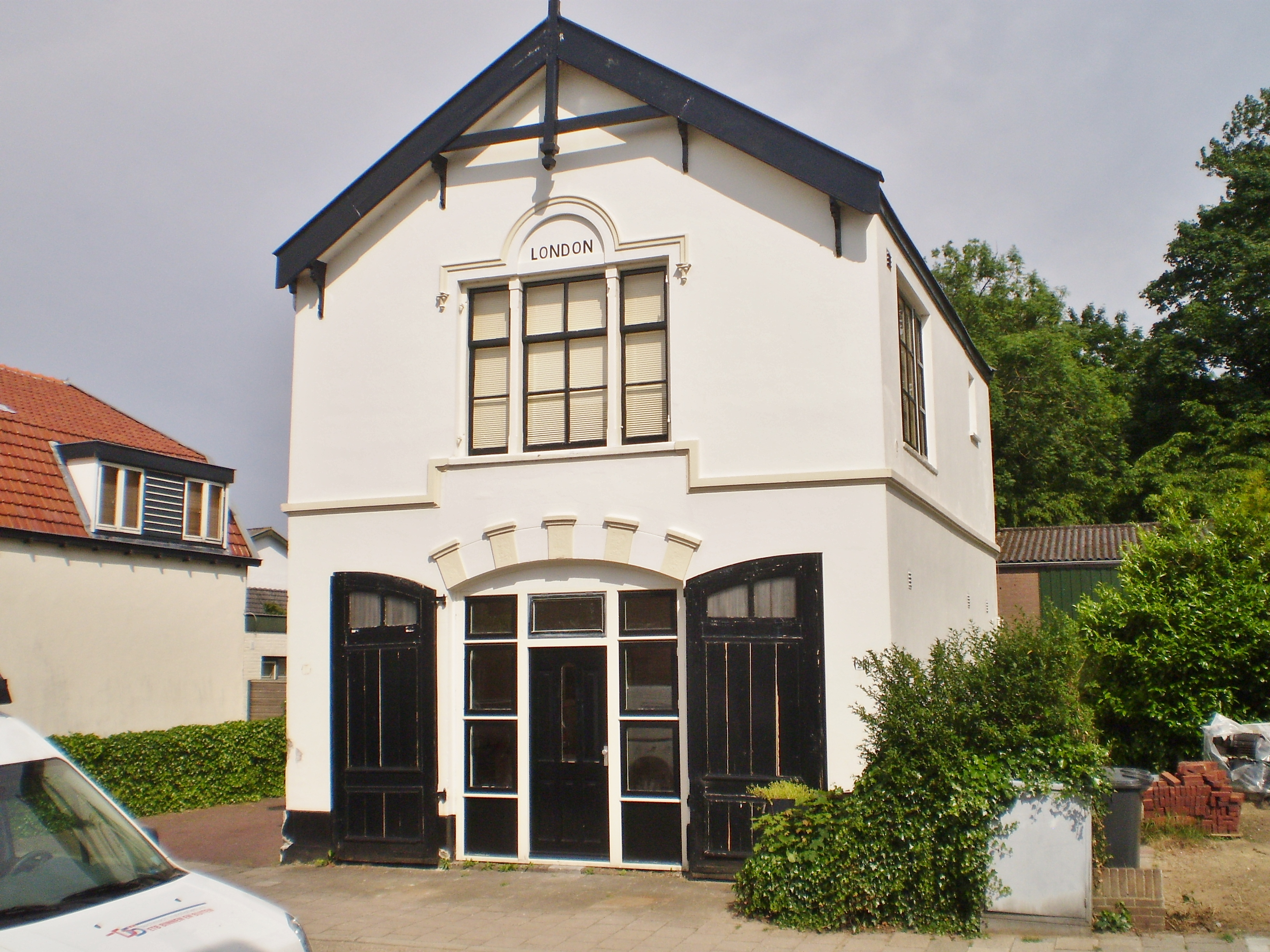 Vanaf de Gaslaan aan de westzijde